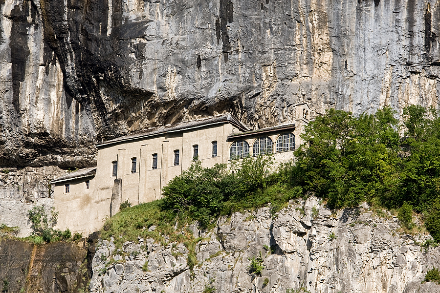 Ermitage et chapelle de Notre-Dame du Scex à St-Maurice